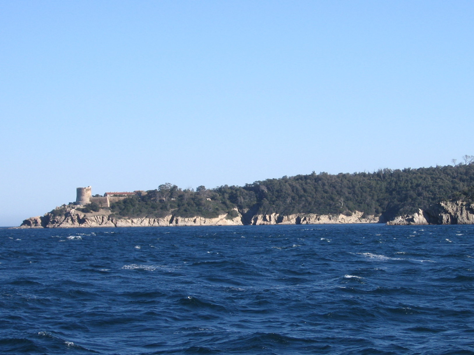 Fort de Port-Man (île de Port-Cros, Hyères, Var, France).